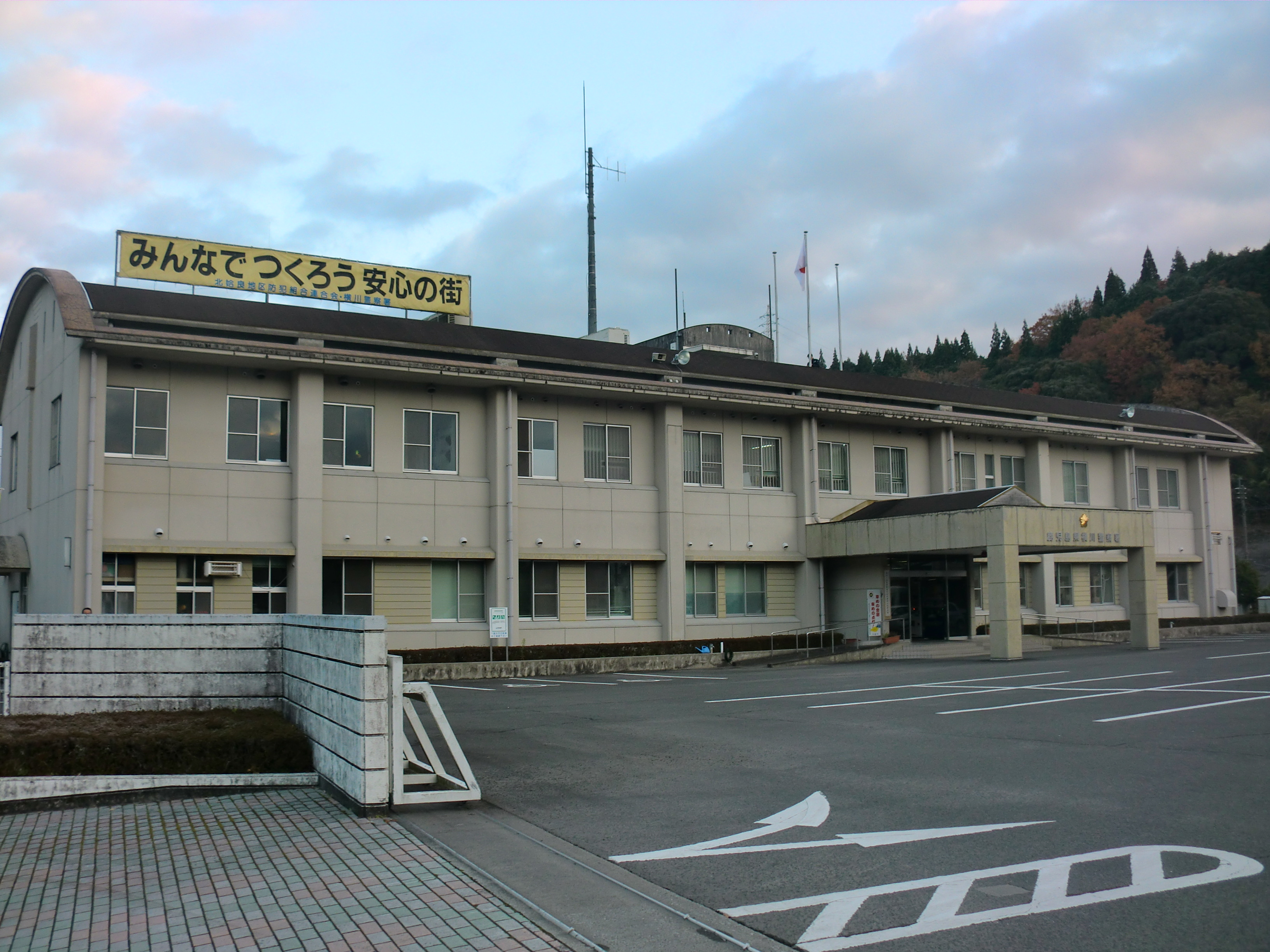 霧島市にある横川警察署